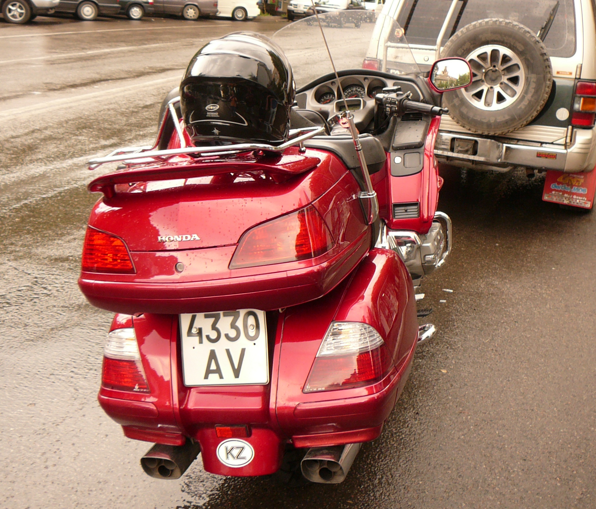 Номер мотоцикла зарегистрированного на физическое лицо. Имеет в формате чёрные символы на белом фоне - 4 цифры и две латинские буквы. Первая буква после цифр обозначает место регистрации.